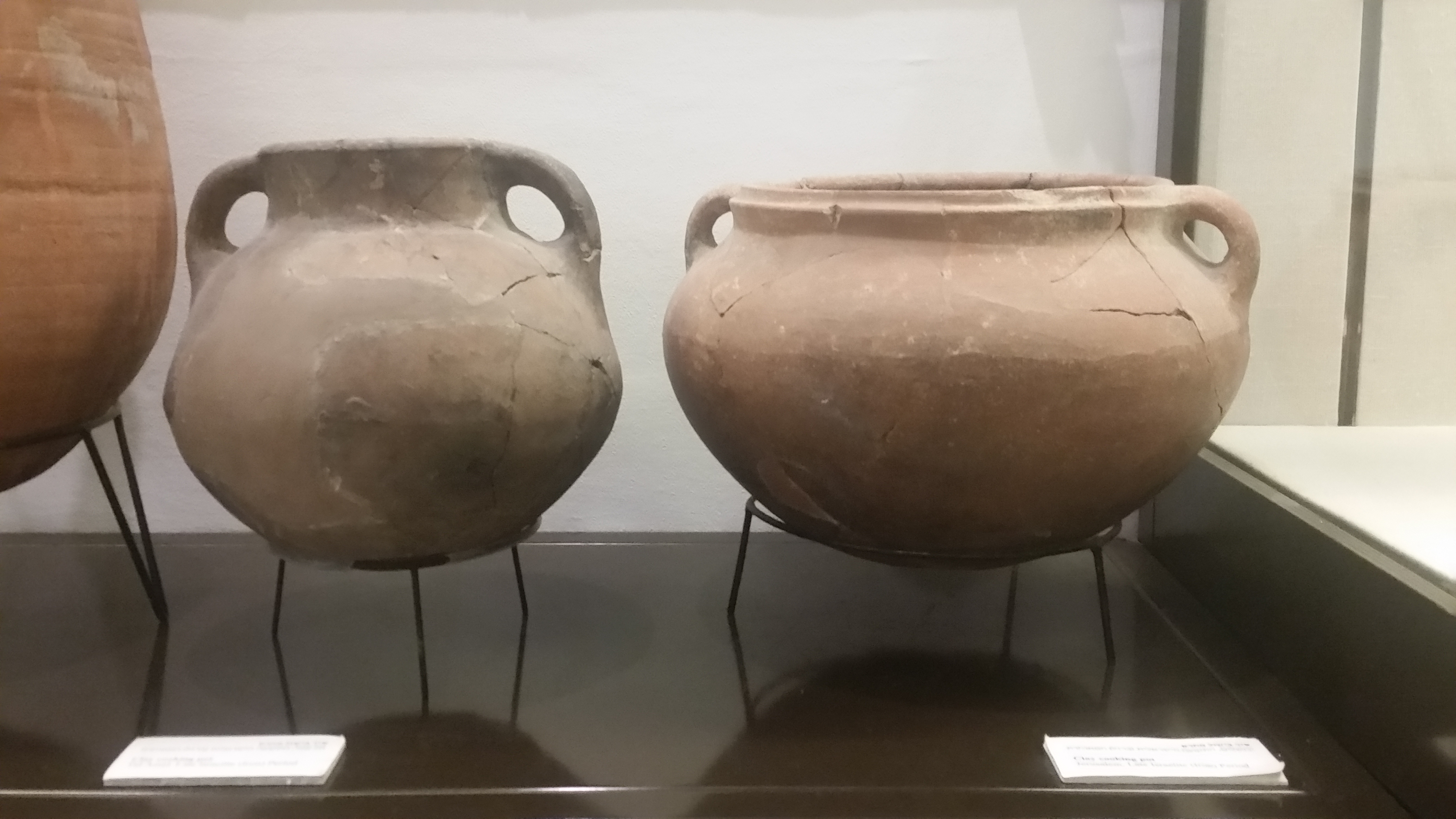 סירי בישול מחרס תקופת הברזל המאוחרת 2 מימין סיר מירושלים משמאל סיר מתל עמל. אוסף מוזיאון הכט